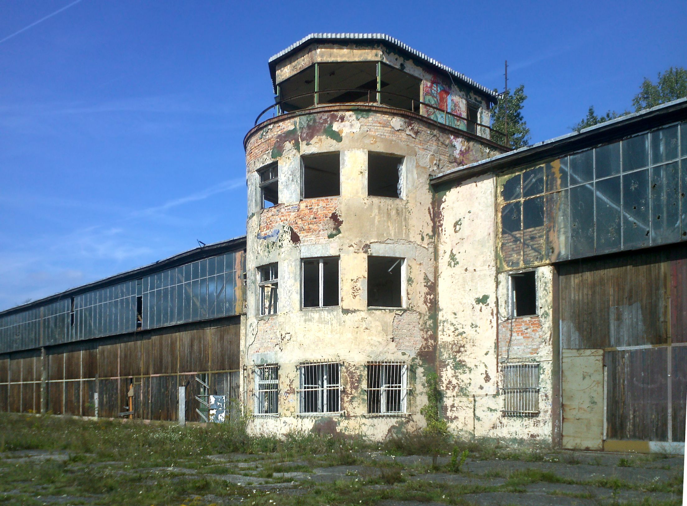 Bücker-Flugzeugwerk in Rangsdorf, Einfliegerhalle mit Kontrollturm.